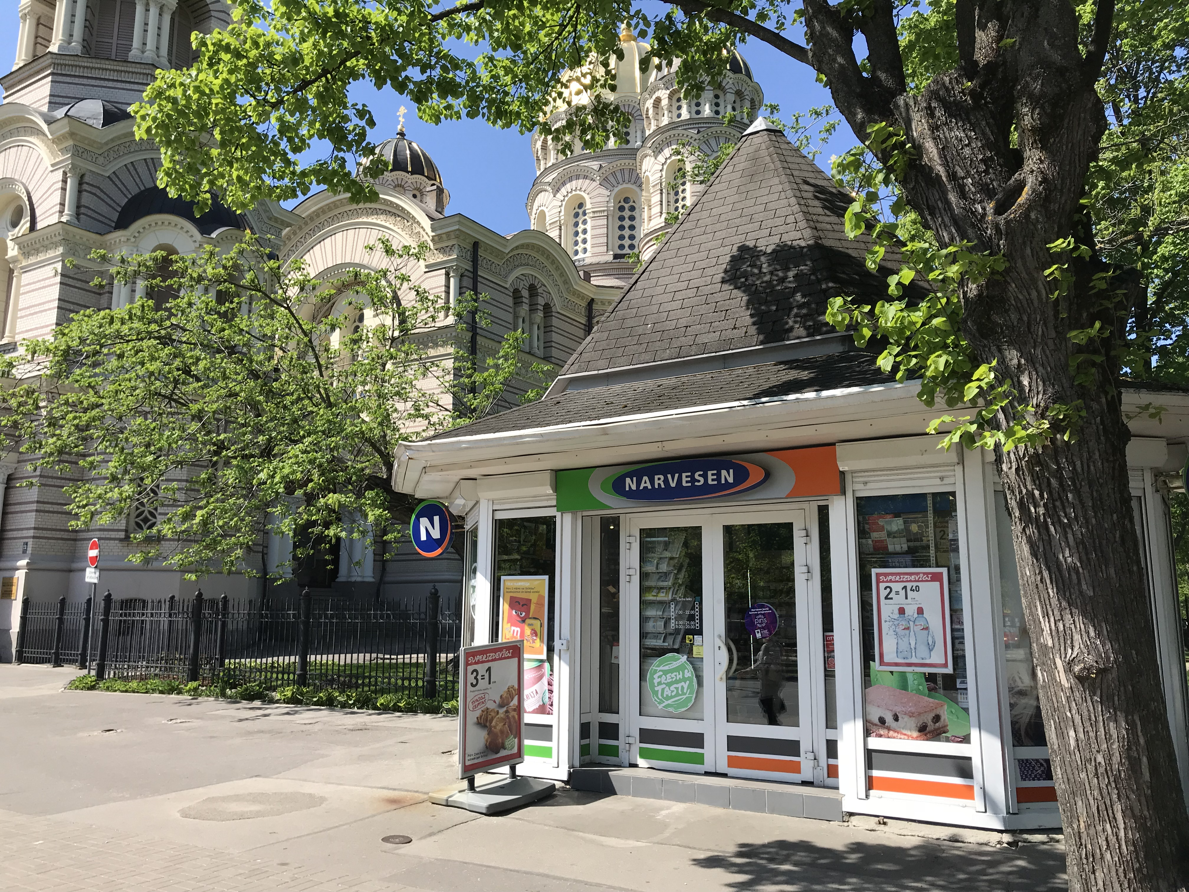 Narvesenkiosk på Brīvības bulvāris vid Esplanadeparken och Rīgas Kristus Piedzimšanas katedrāle i Riga, Lettland, den 10 maj 2018.